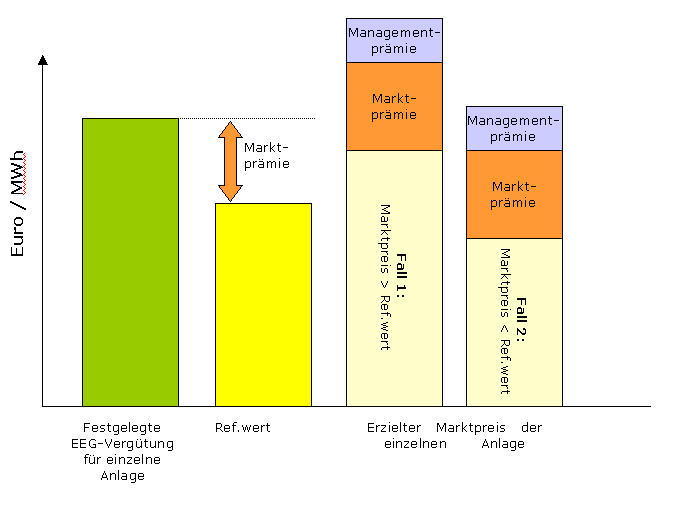 Erläuterung des Marktprämienmodells mit optionaler Marktprämie und Managementprämie im Rahmen der Direktvermarktung nach dem EEG 2012